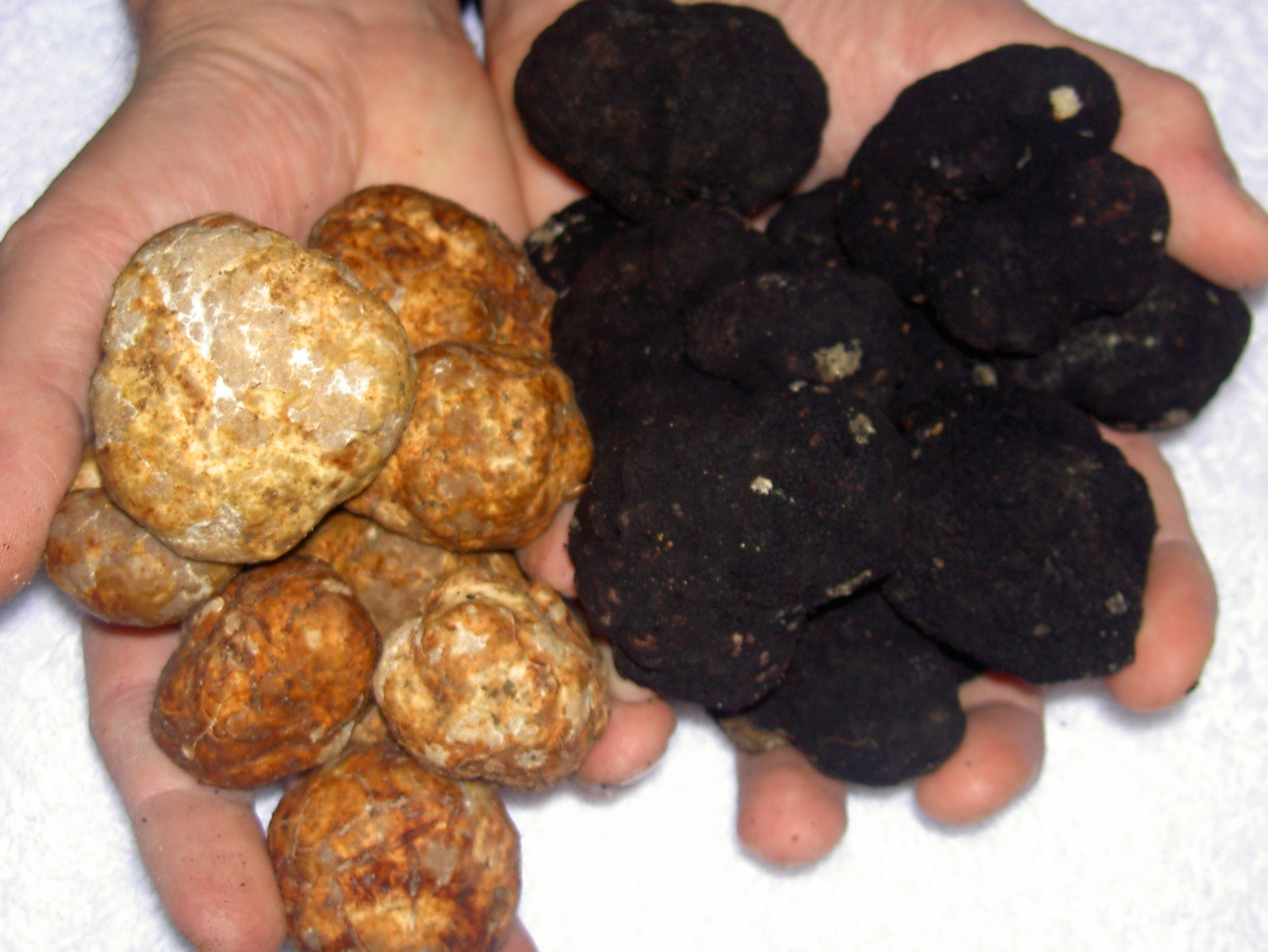 دنبلان سیاه و سفید